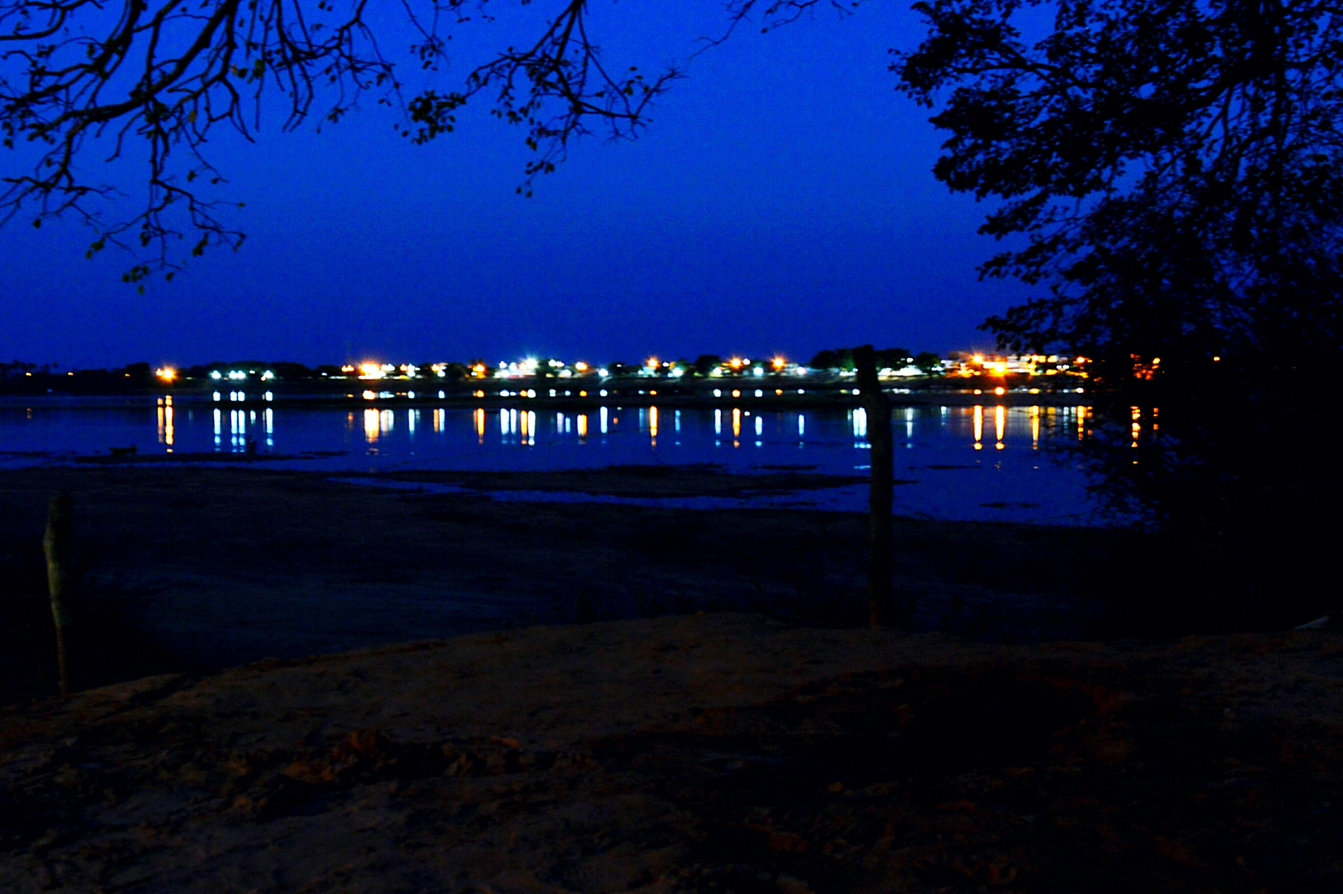 Foto ISO 200 3 segundos exposição abertura total do diafragma,Rio são Francisco cidade de Malhada Bahia